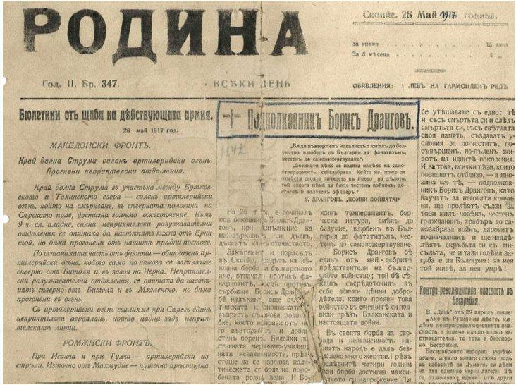 Вестник „Родина“, Скопие.